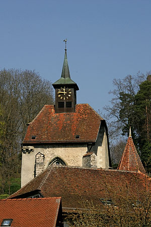 Lucens: Chapelle Sainte-Agnès